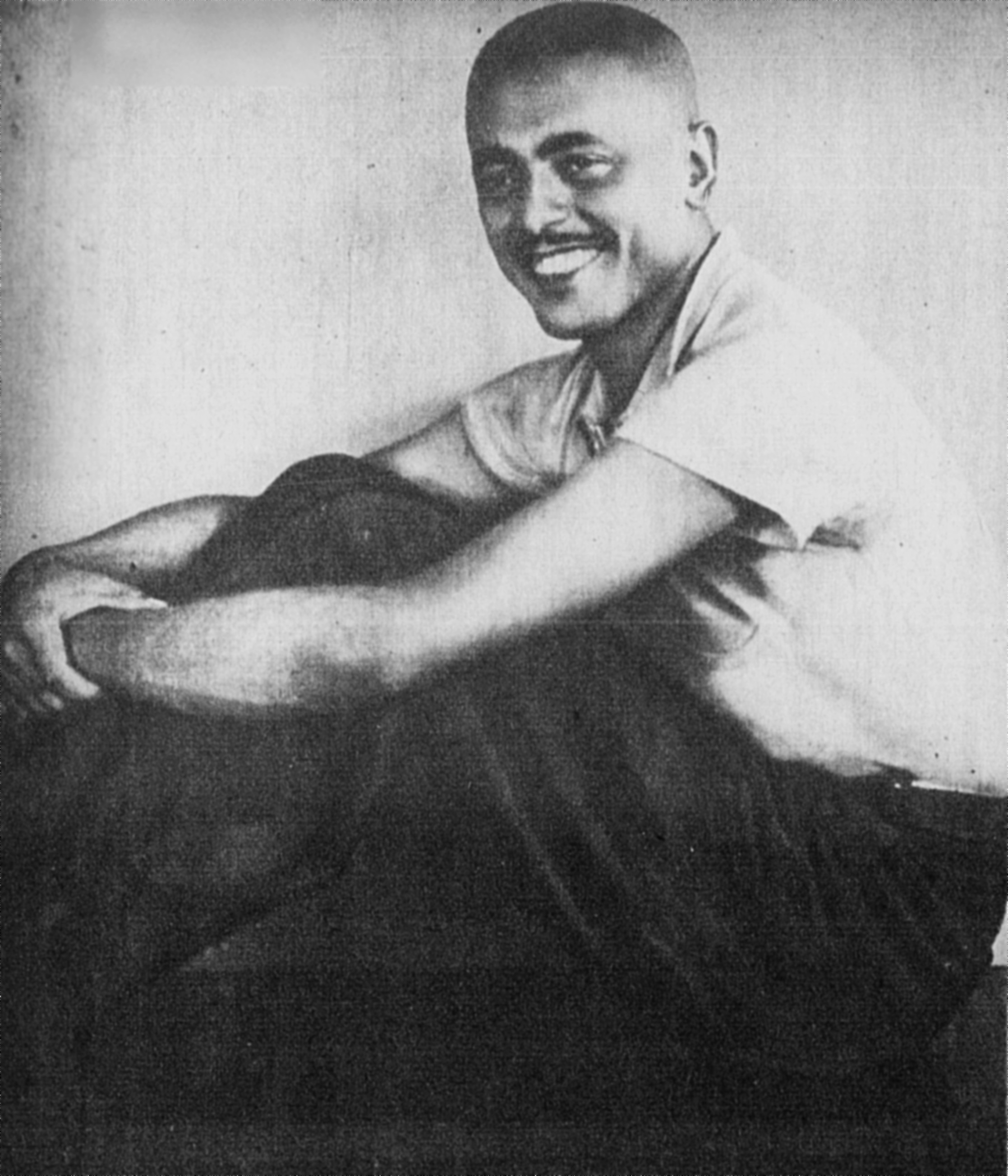 O músico Assis Valente, em "pose exclusiva para Carioca".